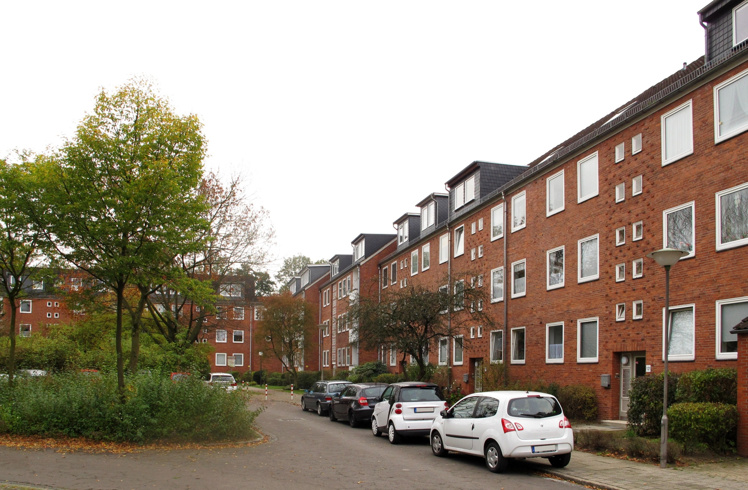 Wohnbauanlage Sparer-Dank (Anlage 1, Blick von Kulenkampffallee in den östlichen Wohnhof), Bremen im Oktober 2014; Stadtteil: Schwachhausen; Ortsteil: Neu-Schwachhausen; Baujahr: 1961-1966; Architekten: Gerhard Müller-Menckens, Friedrich Heuer und Gunter Müller (alle Bremen)